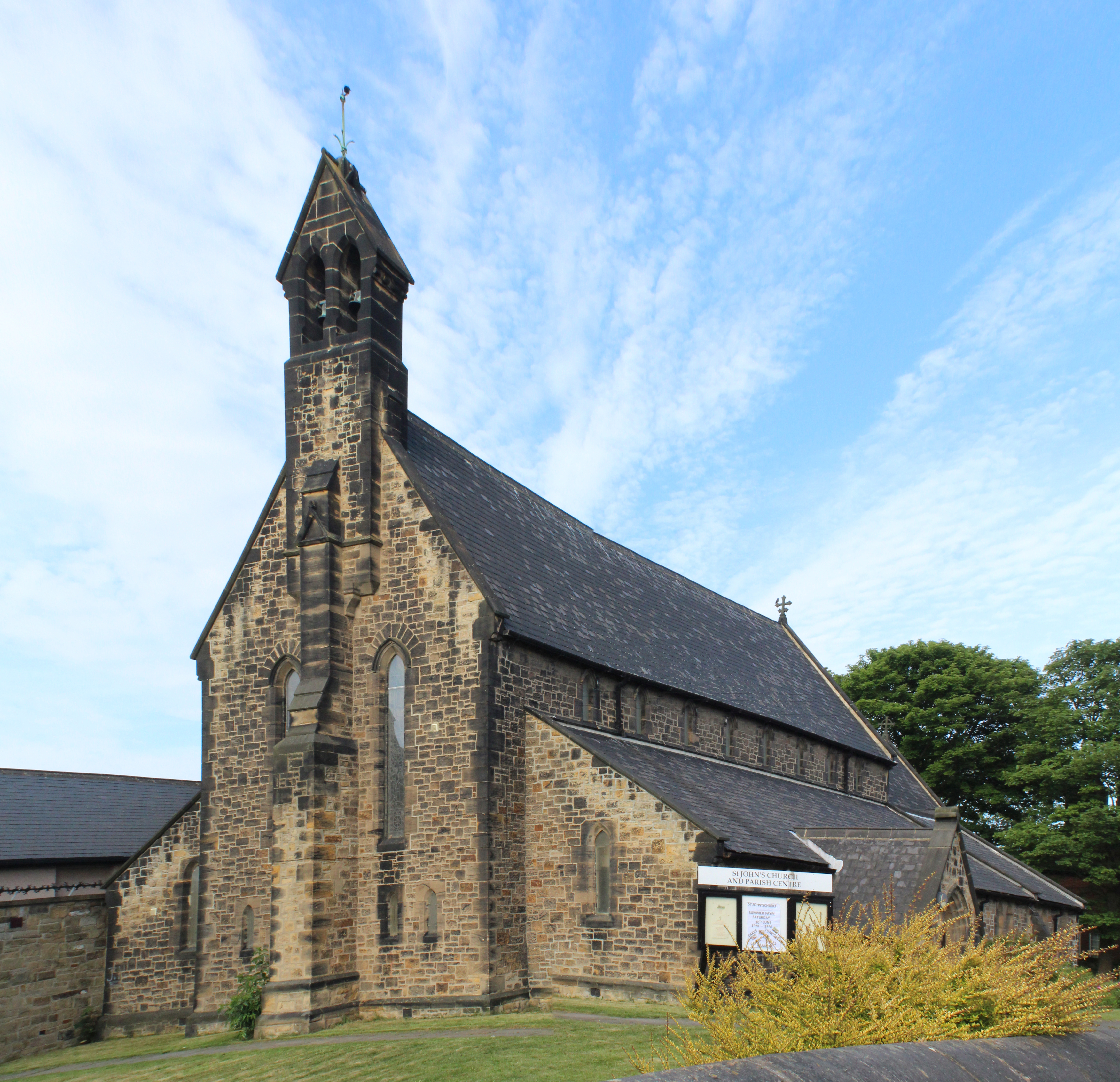 Église Saint-Jean, Percy Main, North Tyneside.